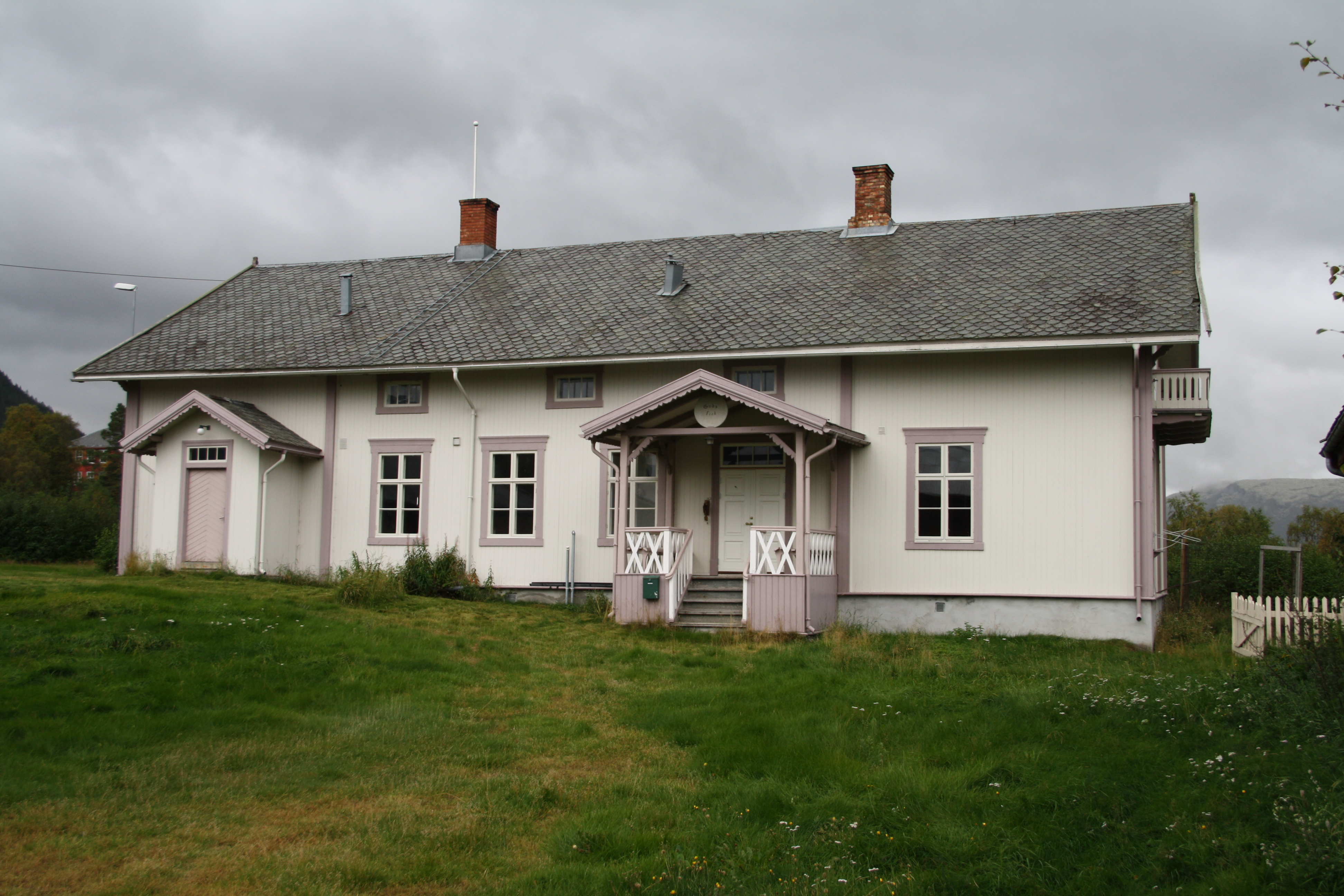 Alvdal prestegård